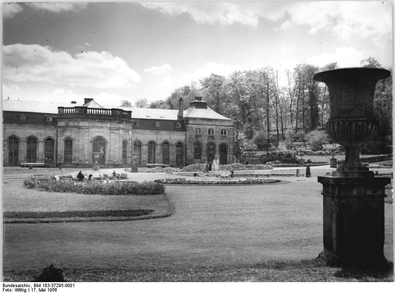 Gotha, Orangerie Zentralbild Erfurt Wittig 17.5.1956 Wjt-Qu. Die Orangerie in Gotha wird wieder aufgebaut. Im Rahmen des Nationalen Aufbauwerkes 1956 der Stadt Gotha, wird der Südflügel der Orangerie zu einem Konzertkaffee und Wintergarten ausgebaut. Aus Lotto-Mitteln wurden dafür DM 100 000.-- zur Verfügung gestellt. Noch in diesem Jahr wird der Bau beendet werden. UBz: Blick auf den Südflügel der Orangerie, mit dessen Wiederaufbau bereits begonnen wurde.